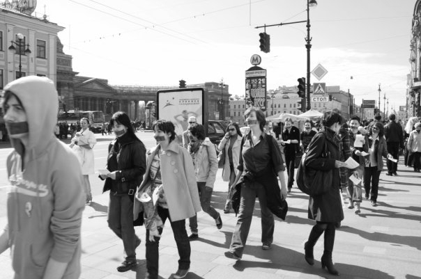 День молчания в Петербурге, в 2009 году.